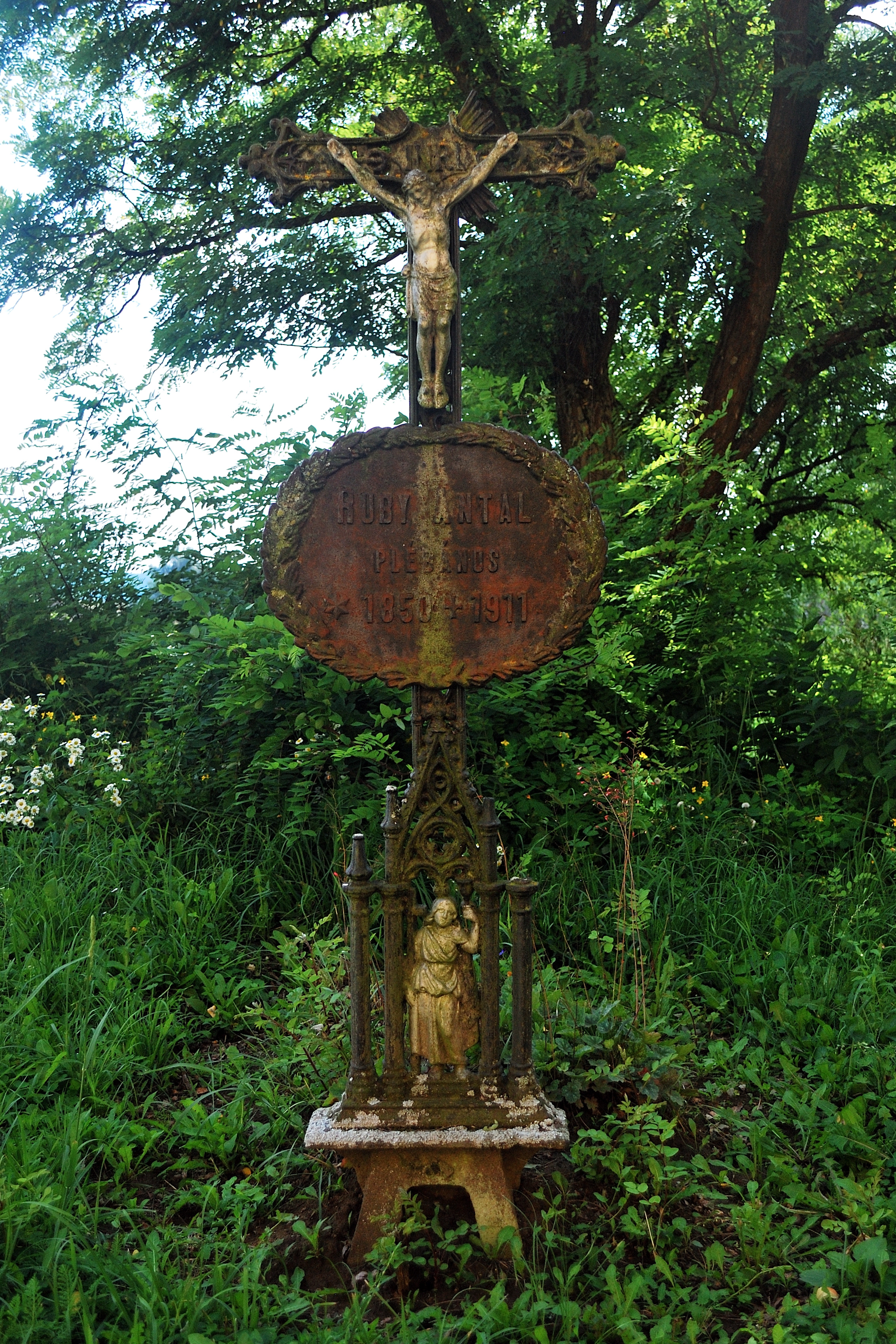 Zabari régi temető sírjai a római katolikus templom mellett